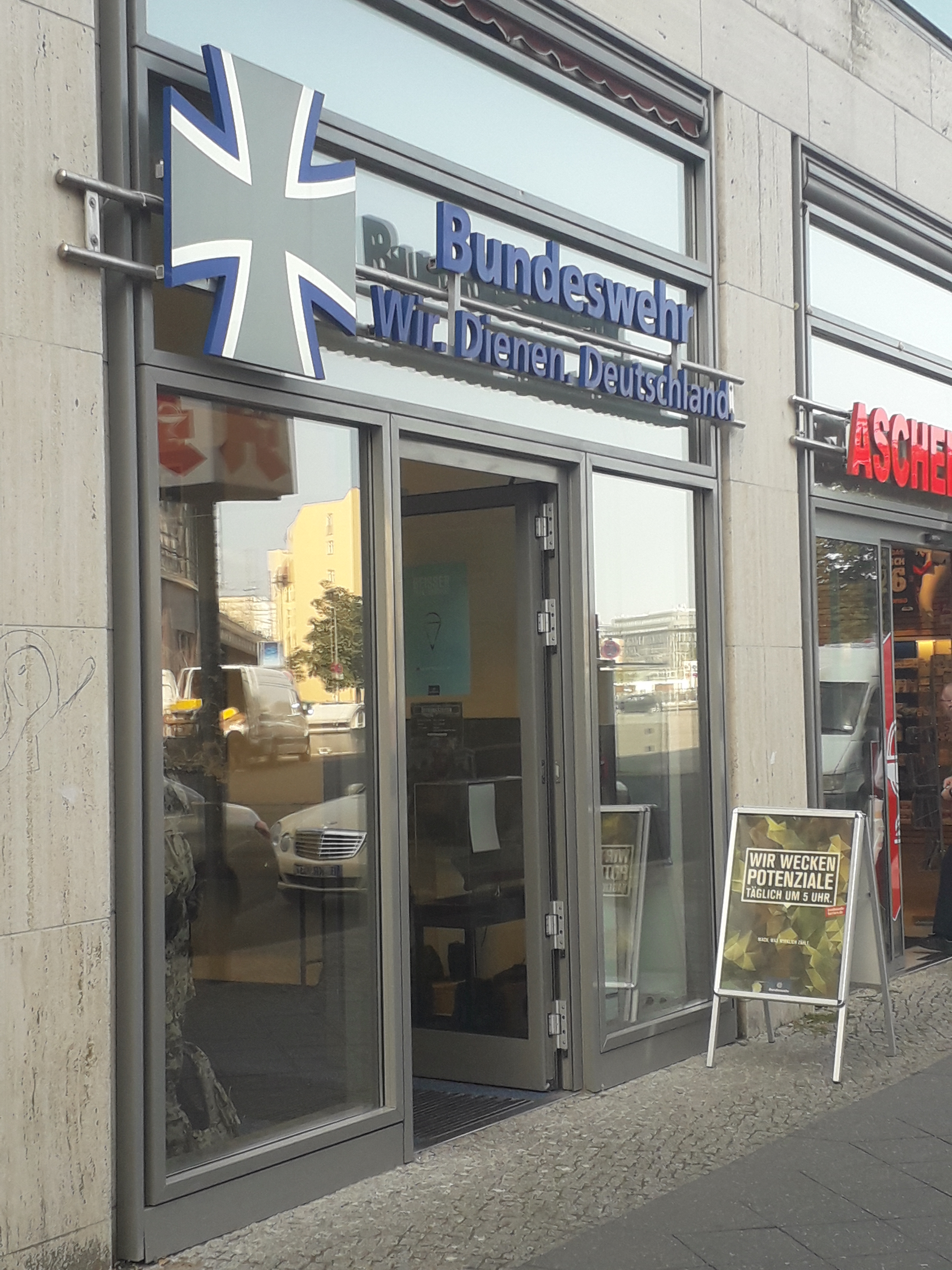 Der am 14. November 2014 eröffnet Showroom der Bundeswehr.